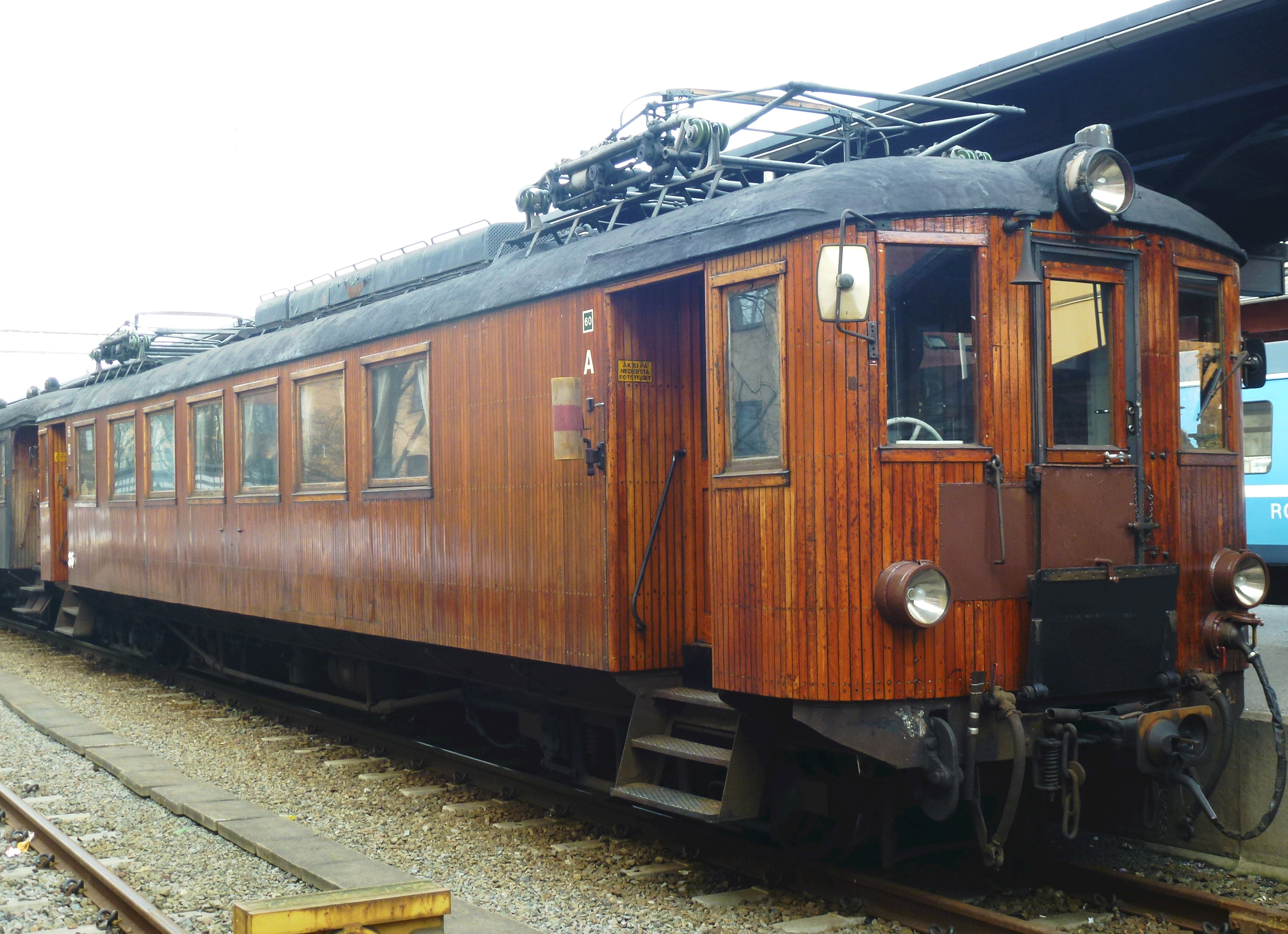 Roslagsbanan X3p 35 - SRJ 18